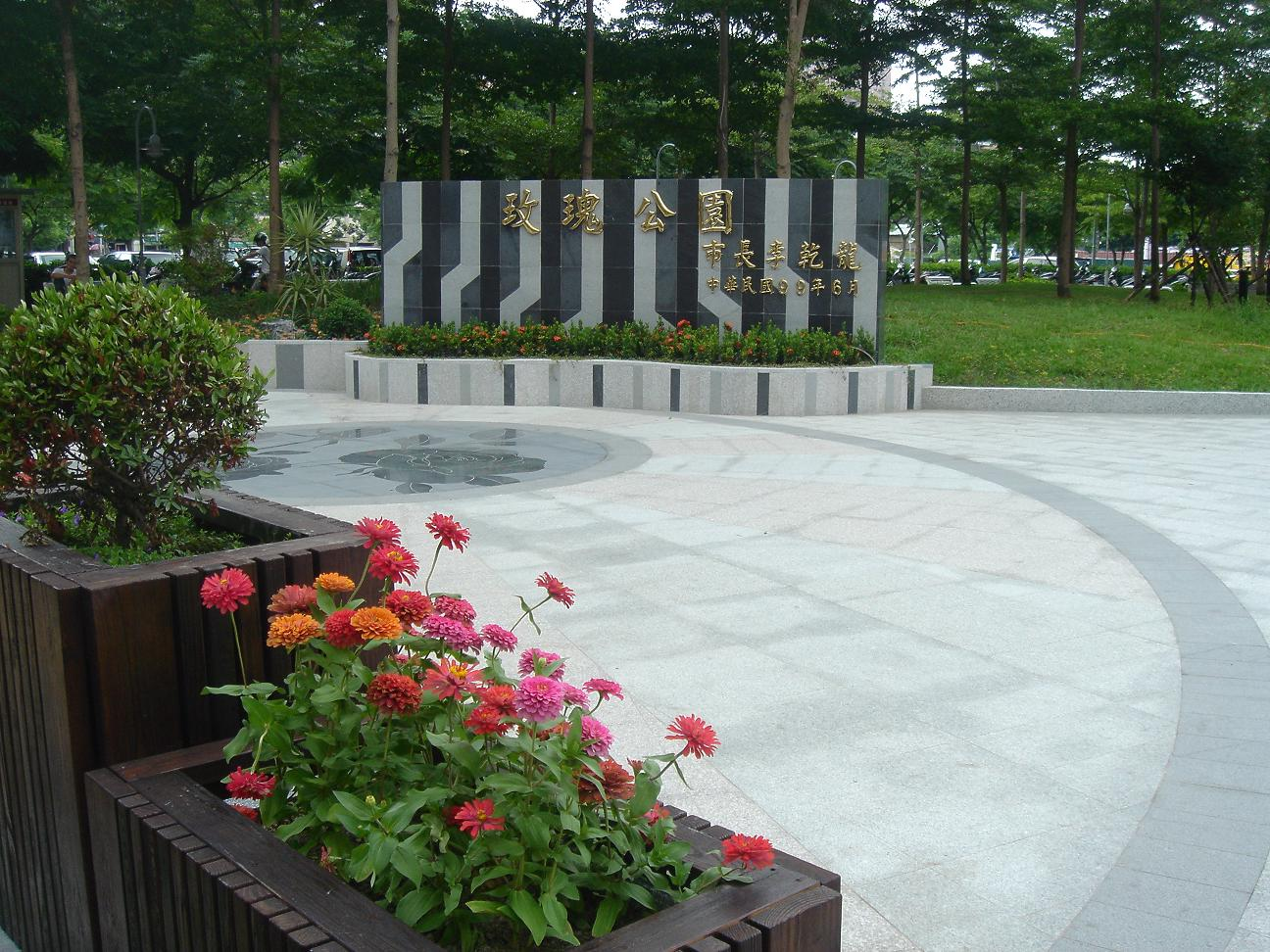 台北縣三重市玫瑰公園題額。